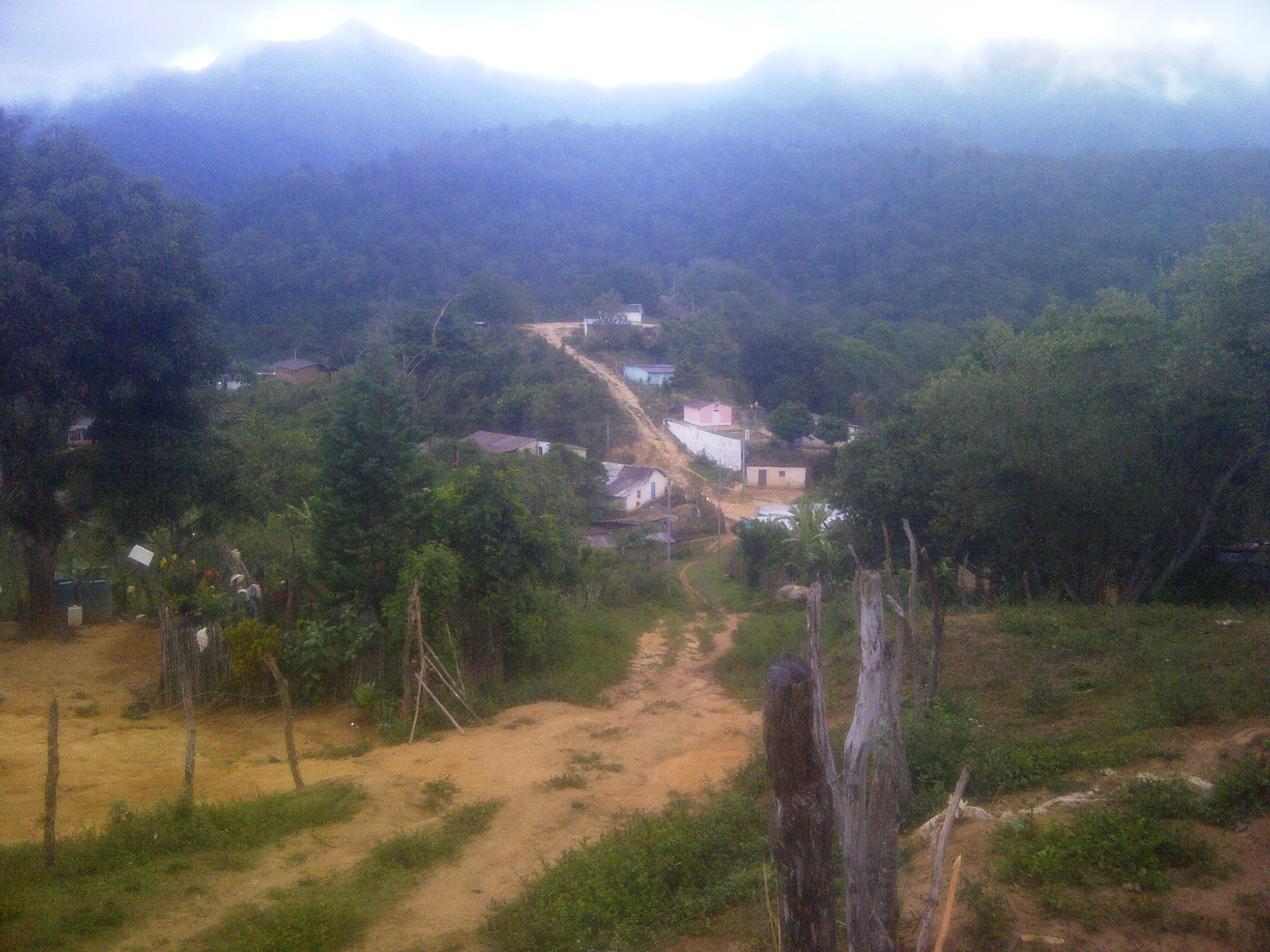 Vista panorámica del Pueblo de Buenos Aires, Anzoategui, Venezuela, en el centro del poblado, resalta la Capilla del Milagroso Nazareno de Buenos Aires